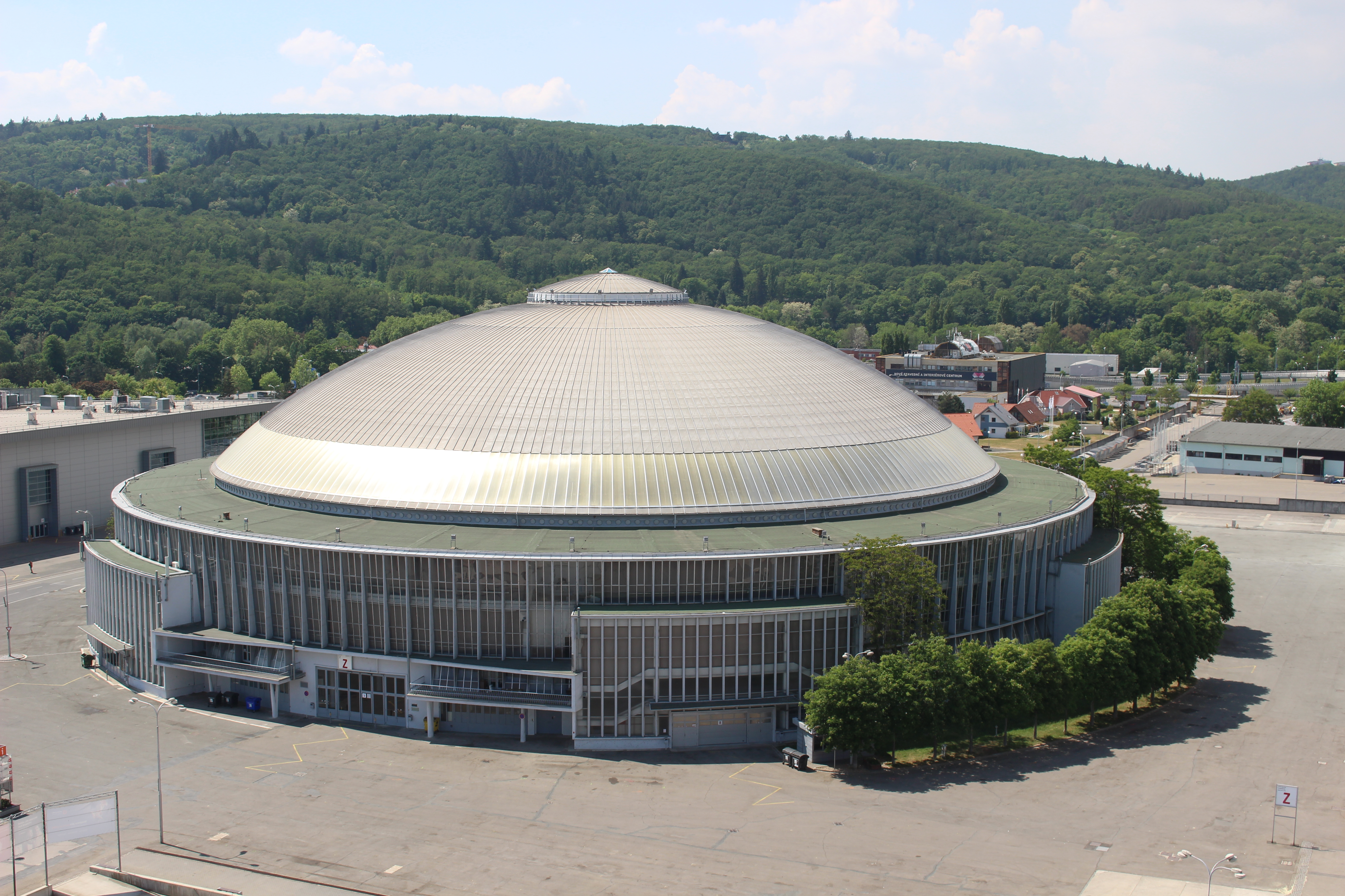 Brněnské výstaviště